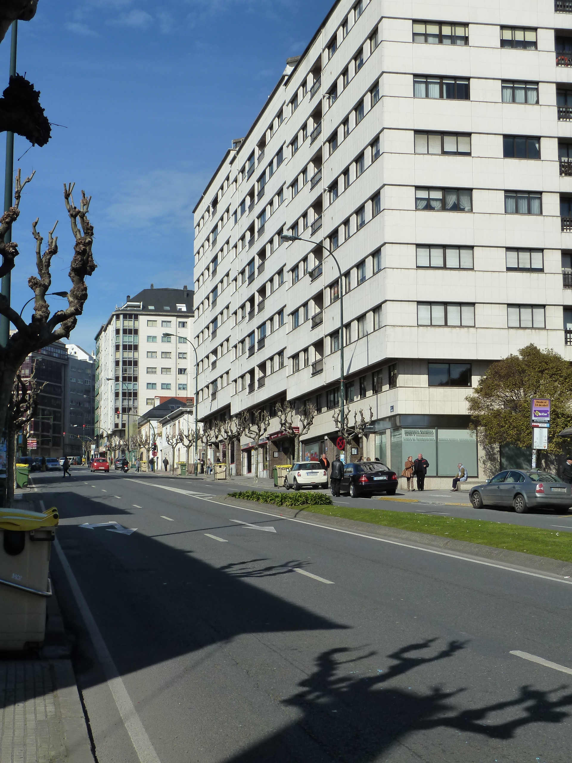 Rúa Ronda de Nelle na Coruña. (2012)